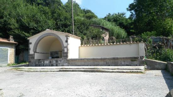 Fontana del Piscero presso il Comune di Latera